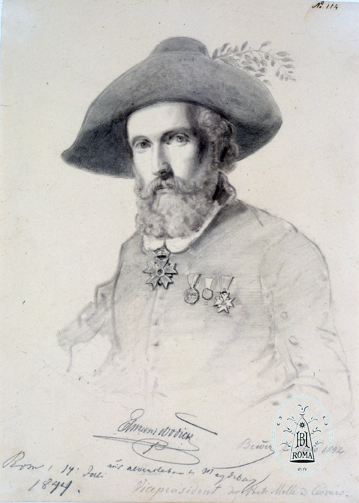 Porträt Edmund Wodick (Vizepräsident der Ponte-Molle und Cervaro 14. Juli 1844), gezeichnet von Clemens Bewer, Rom 1842